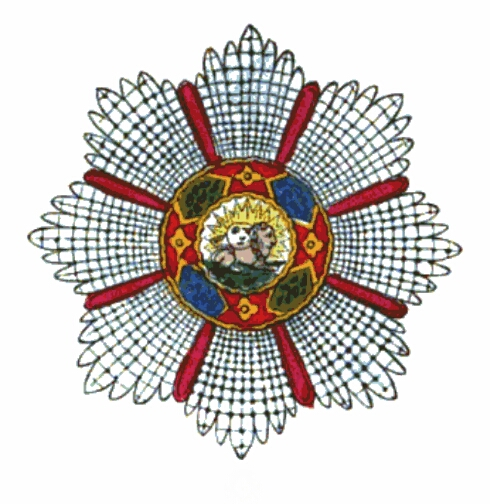 Gwiazda Orderu Lwa i Słońca w 1823 roku